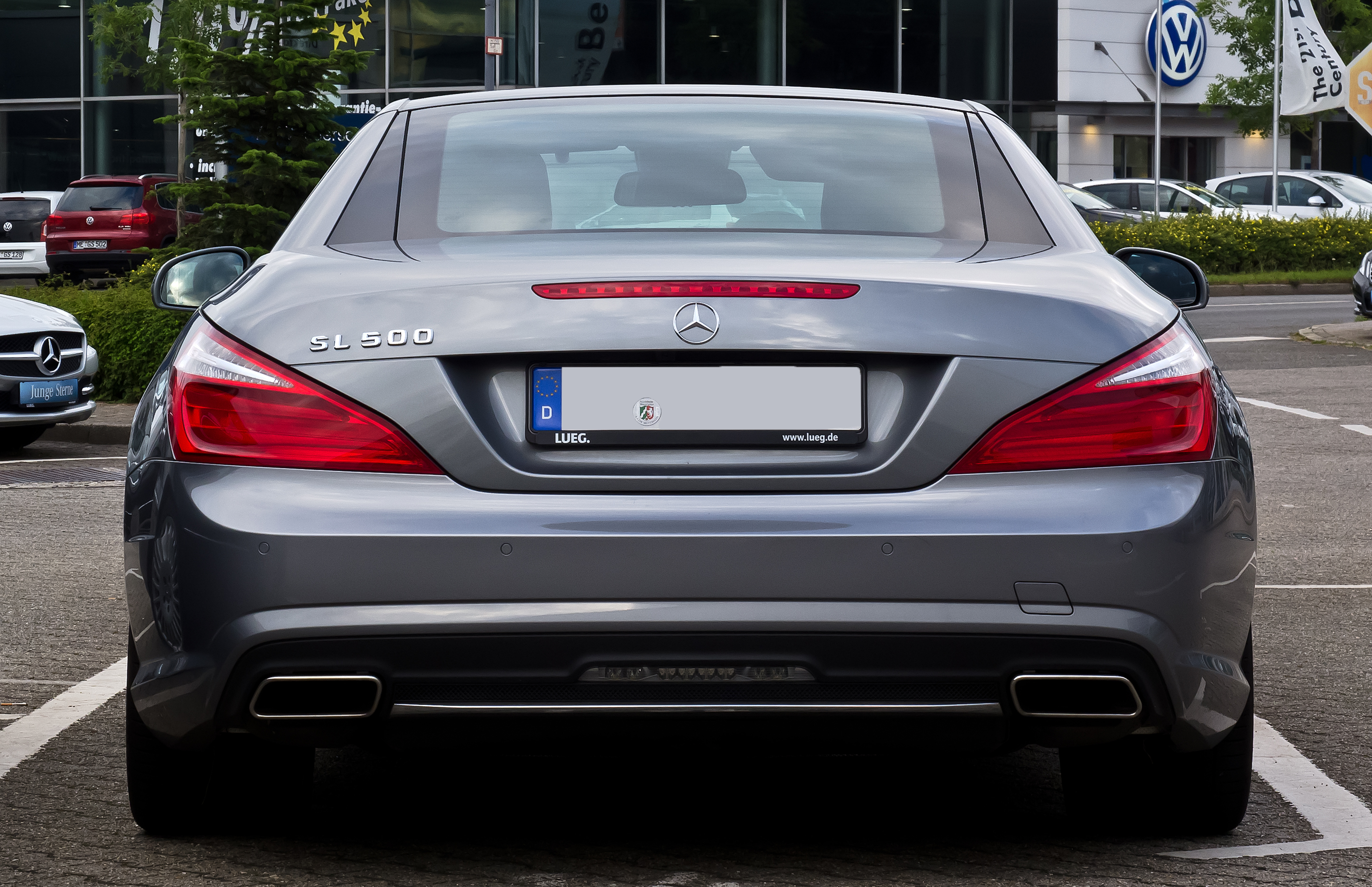 Mercedes-Benz SL 500 BlueEFFICIENCY Sport-Paket AMG (R 231)